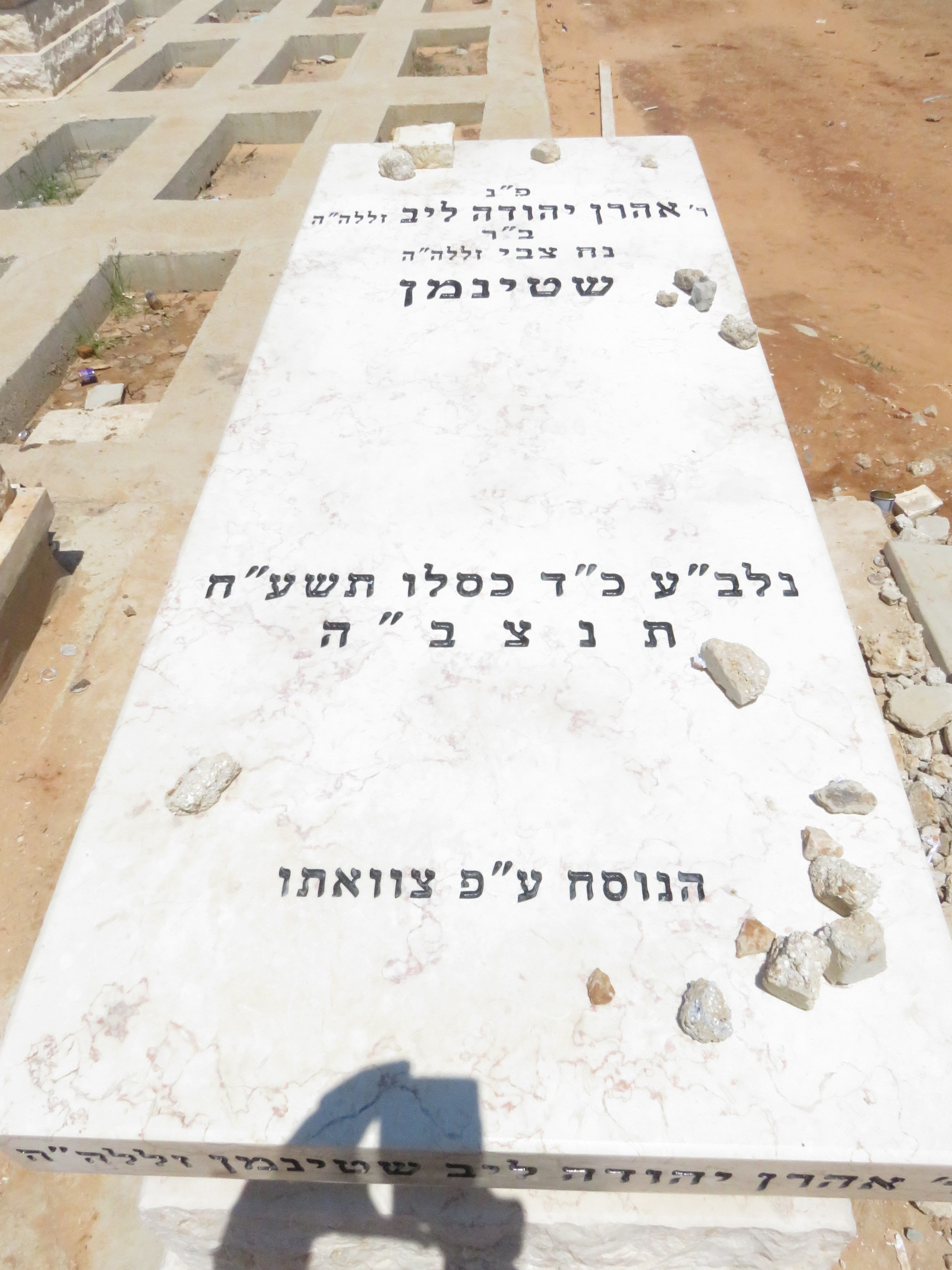 קבר הרב שטיינמן בבית הקברות פוניבז' בבני ברק